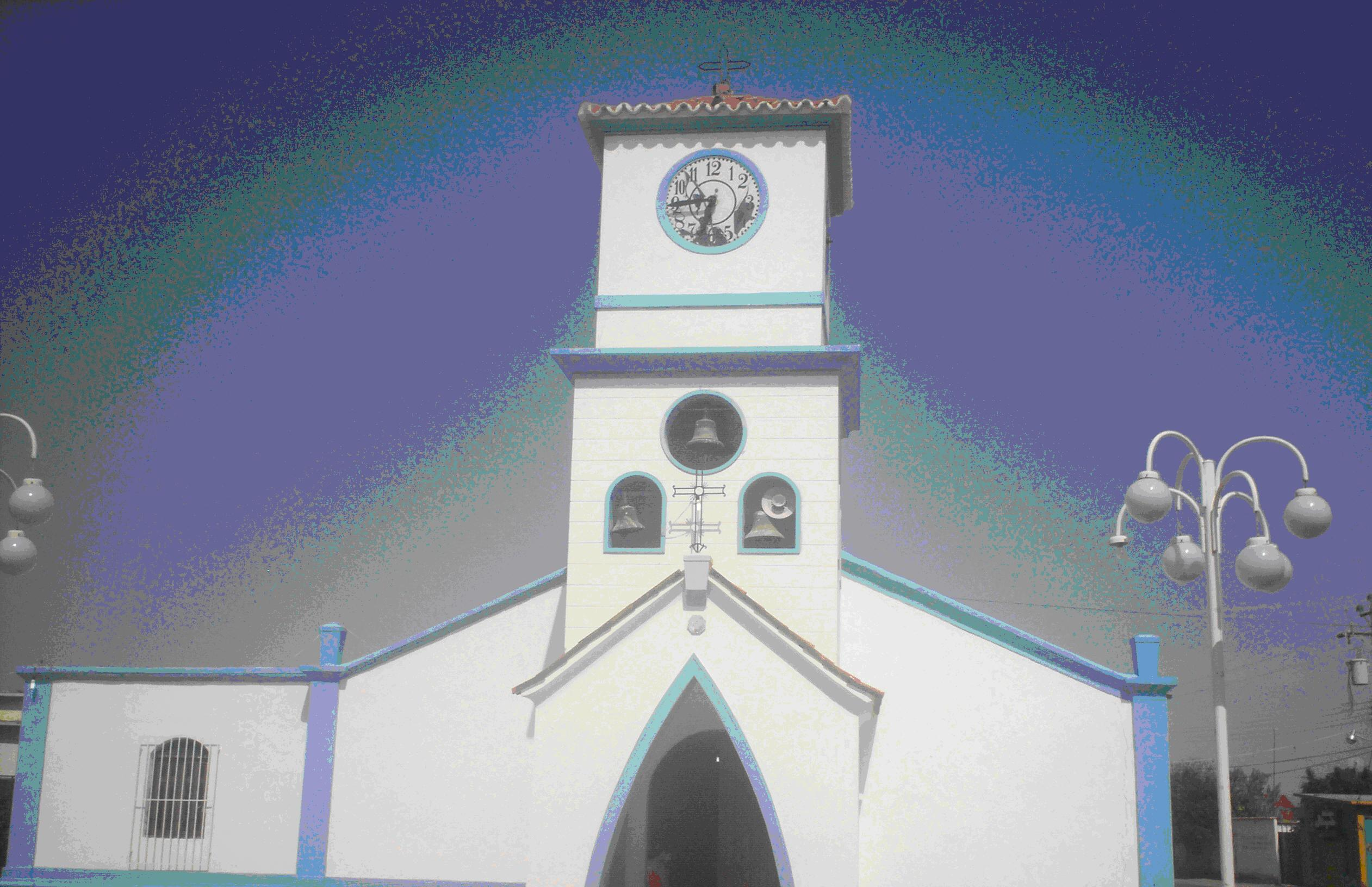 Capatárida.